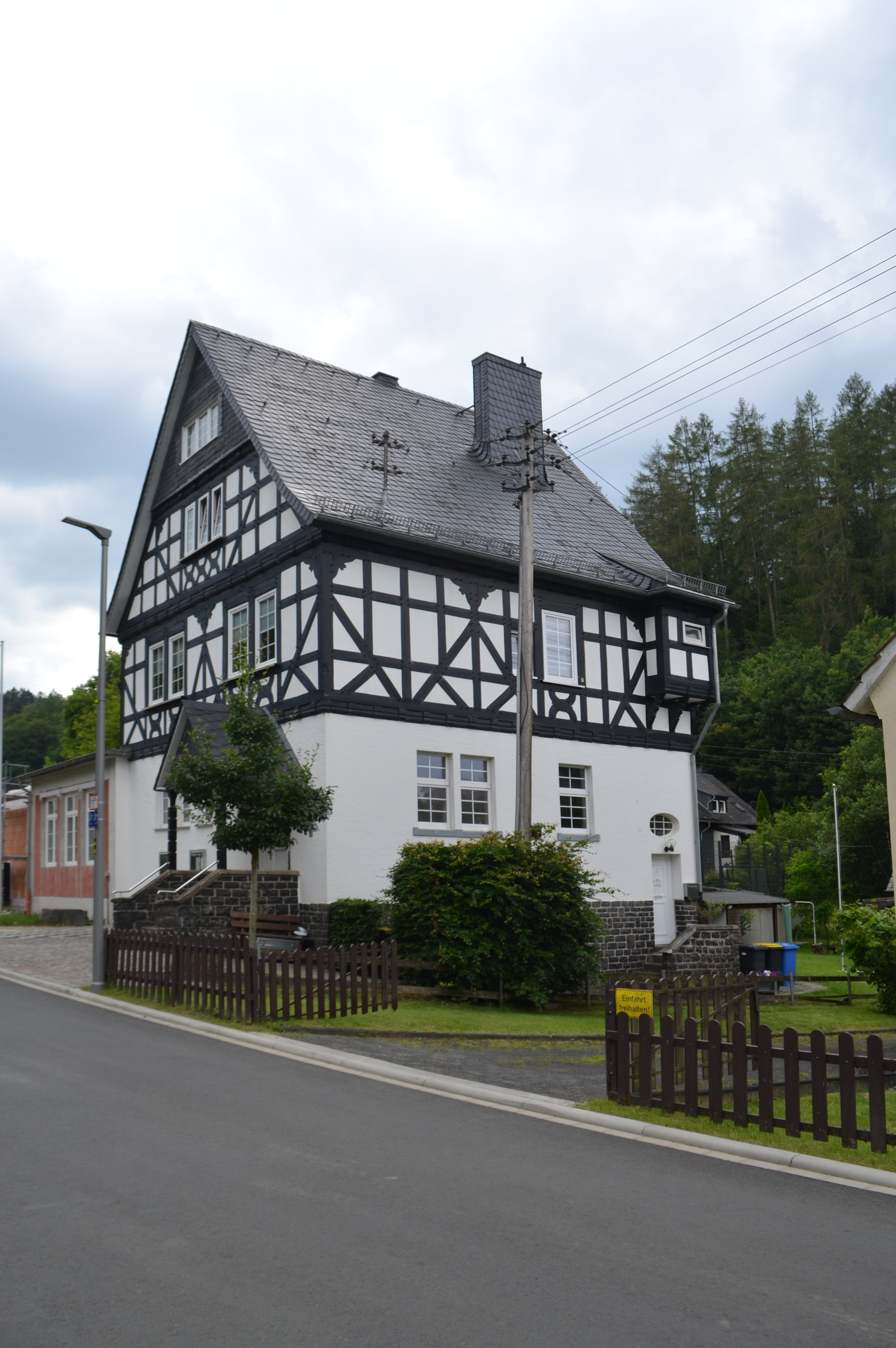 Schutzbach, Schulstraße 23